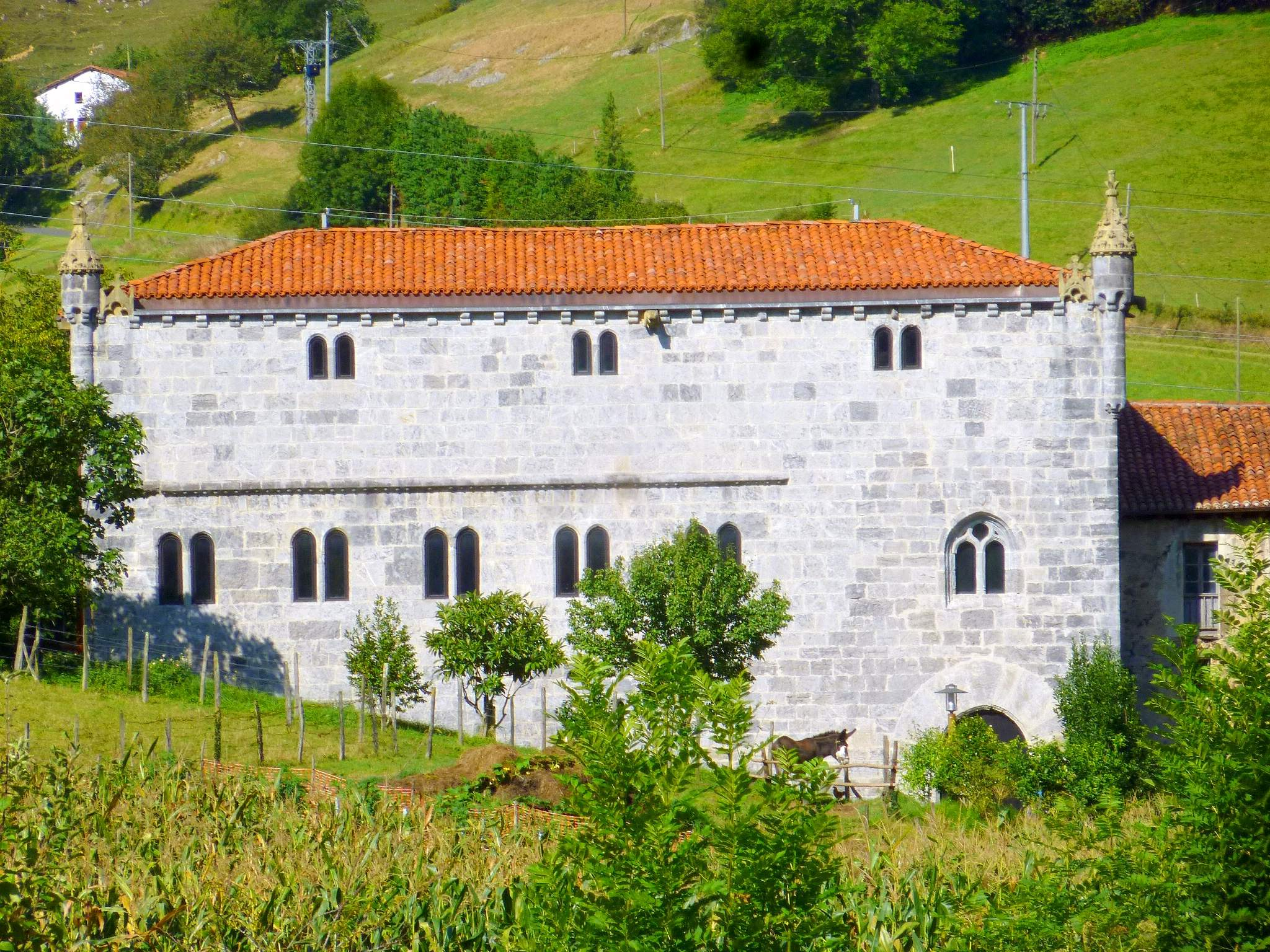 Palacio Lili (Cestona, Guipúzcoa)